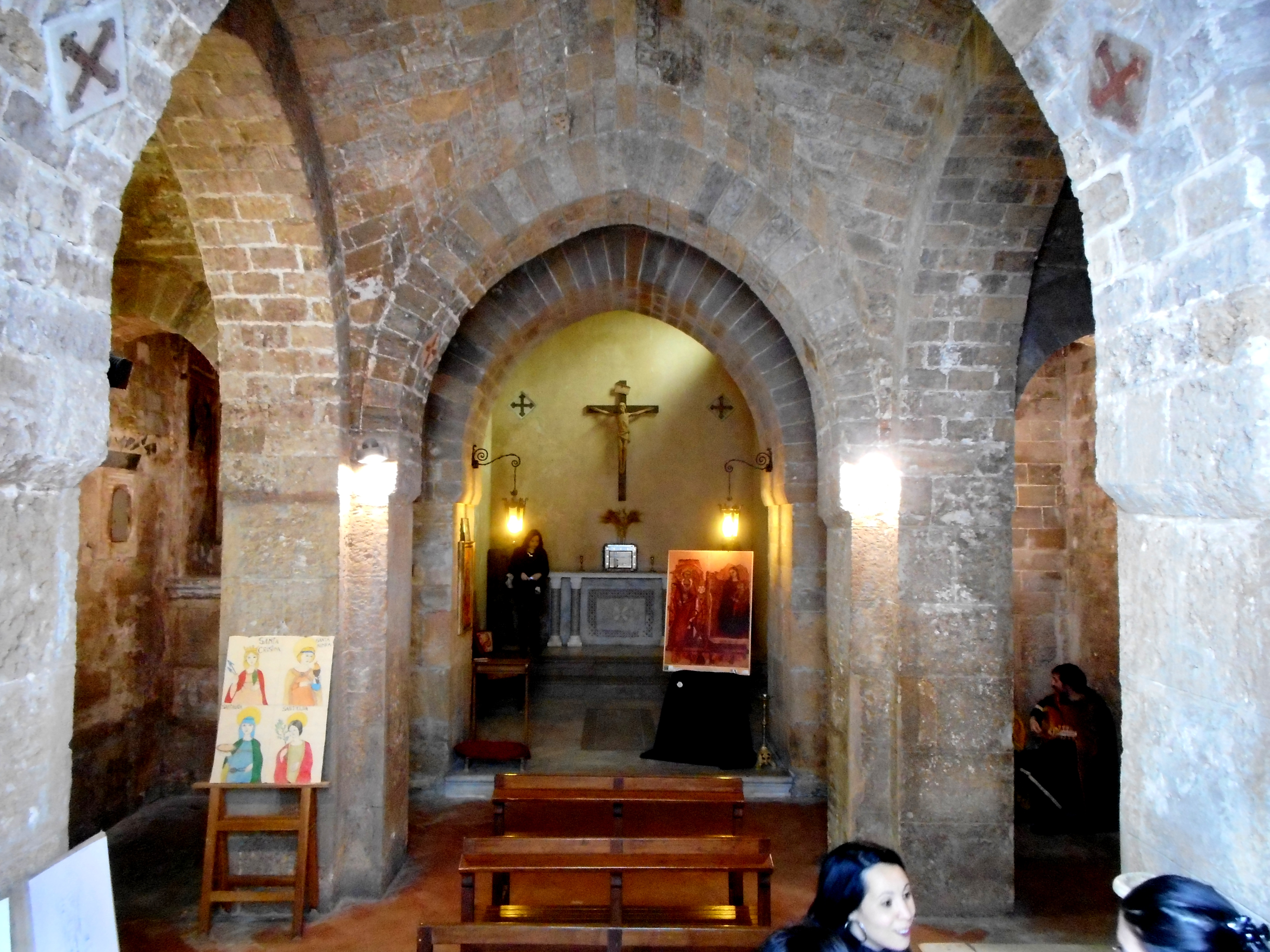 Interno della chiesa di Santa Cristina la Vetere